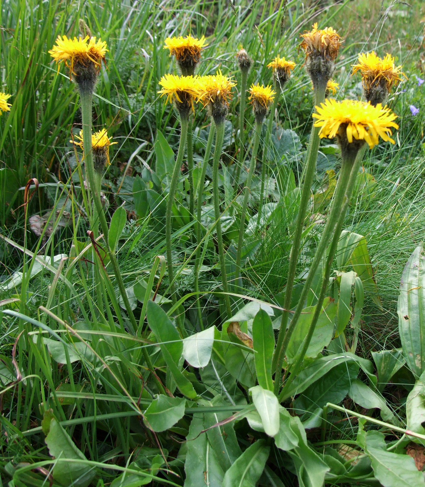 Hypochaeris uniflora (pl. prosienicznik jednogłówkowy), habitat: Spalona Dolina, West Tatra Mountains